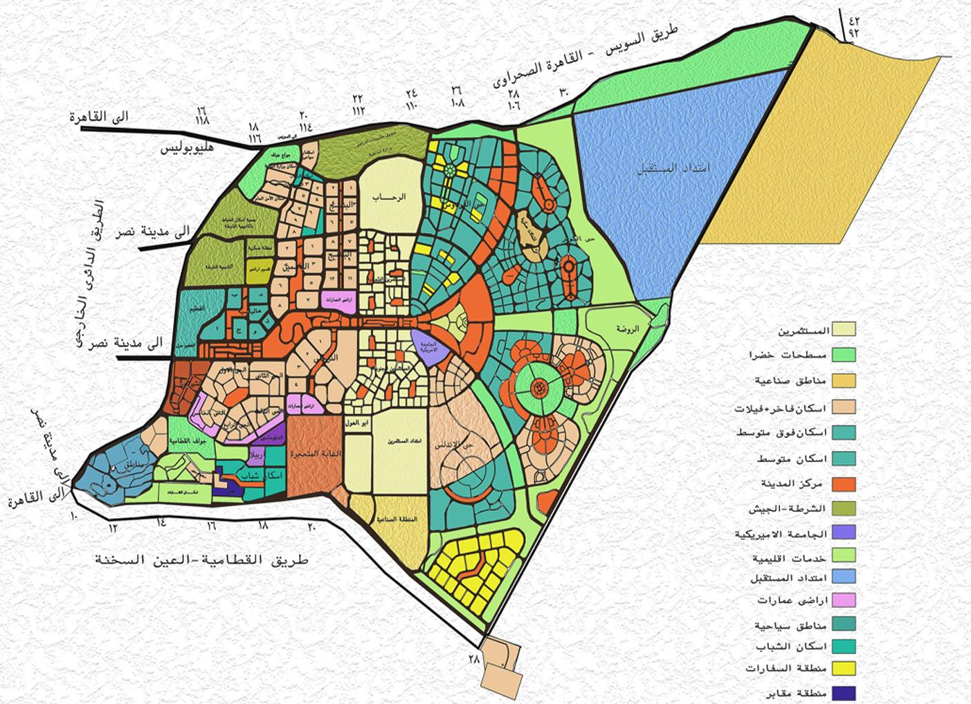 خريطة مدينة القاهرة الجديدة، محافظة حلوان